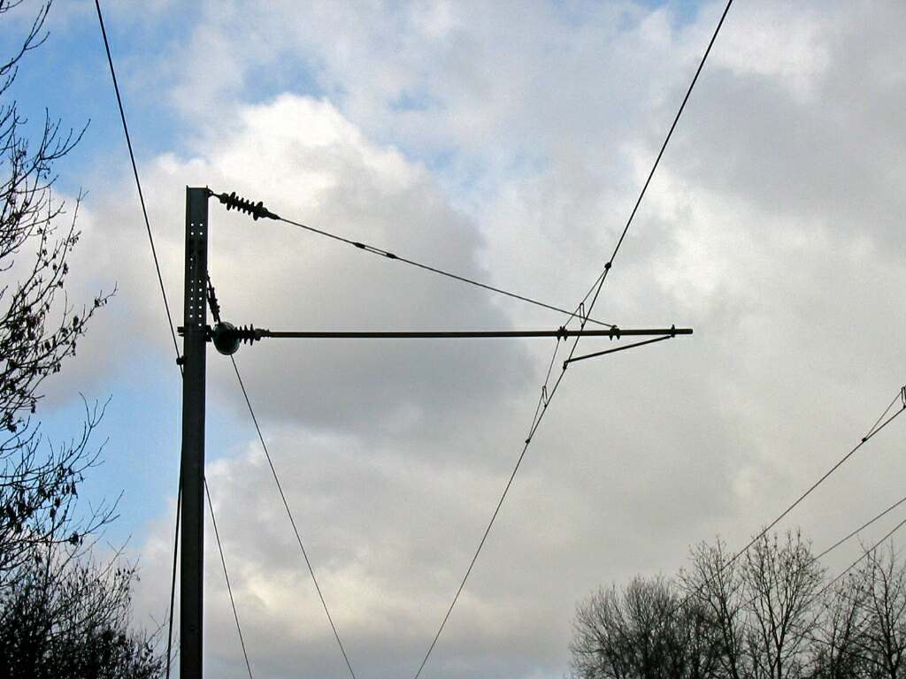 Caténaire 25 kV simplifiée (ligne Plaisir-Épône, Yvelines) Photo JH Mora ; janvier 2005